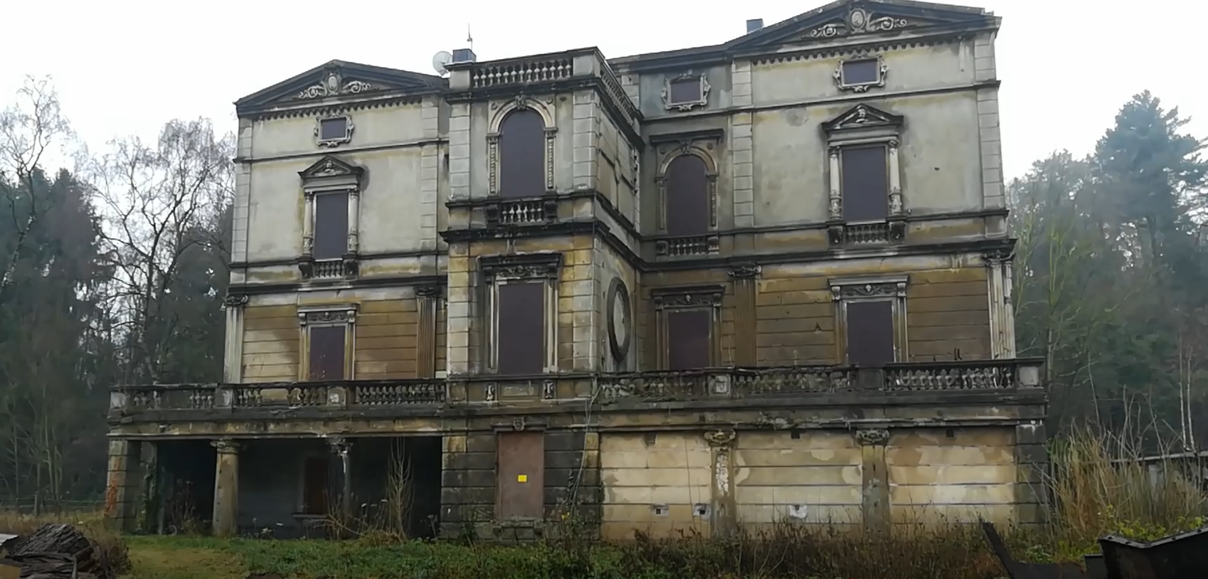 Leehrstehende, mit Brettern versiegelte Villa Buth